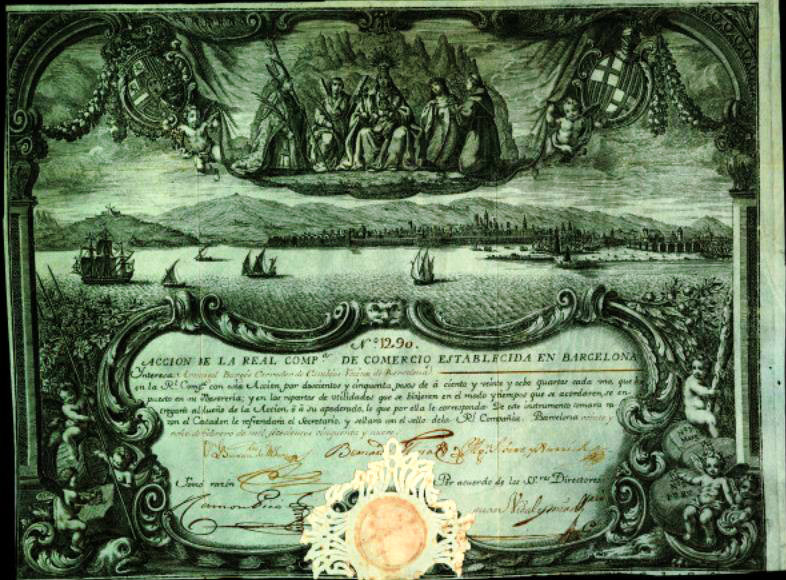 Acción de la Real Compañía de Comercio de Barcelona (1759).